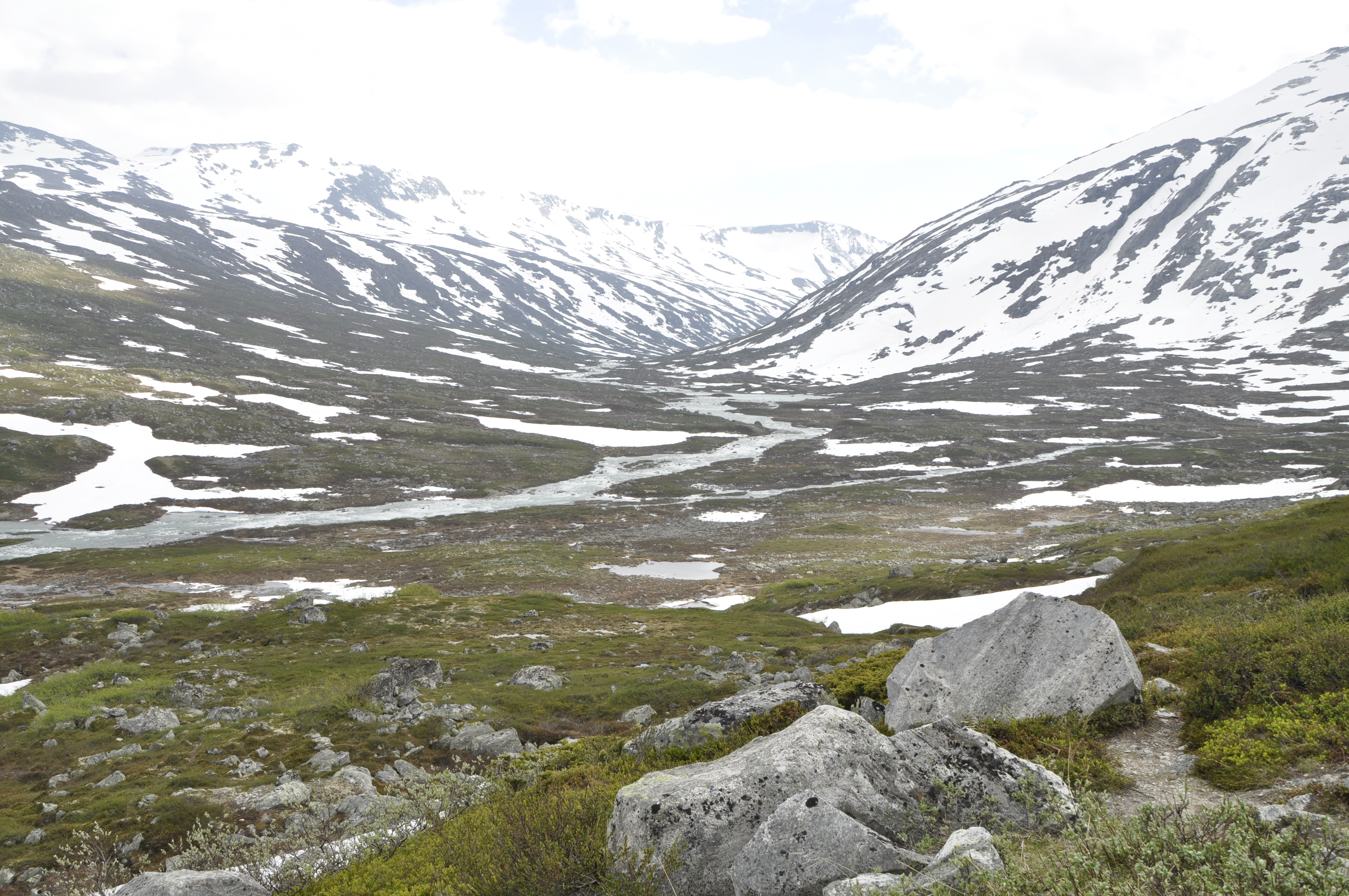 Utsikt fra gamle Strynefjellsveg